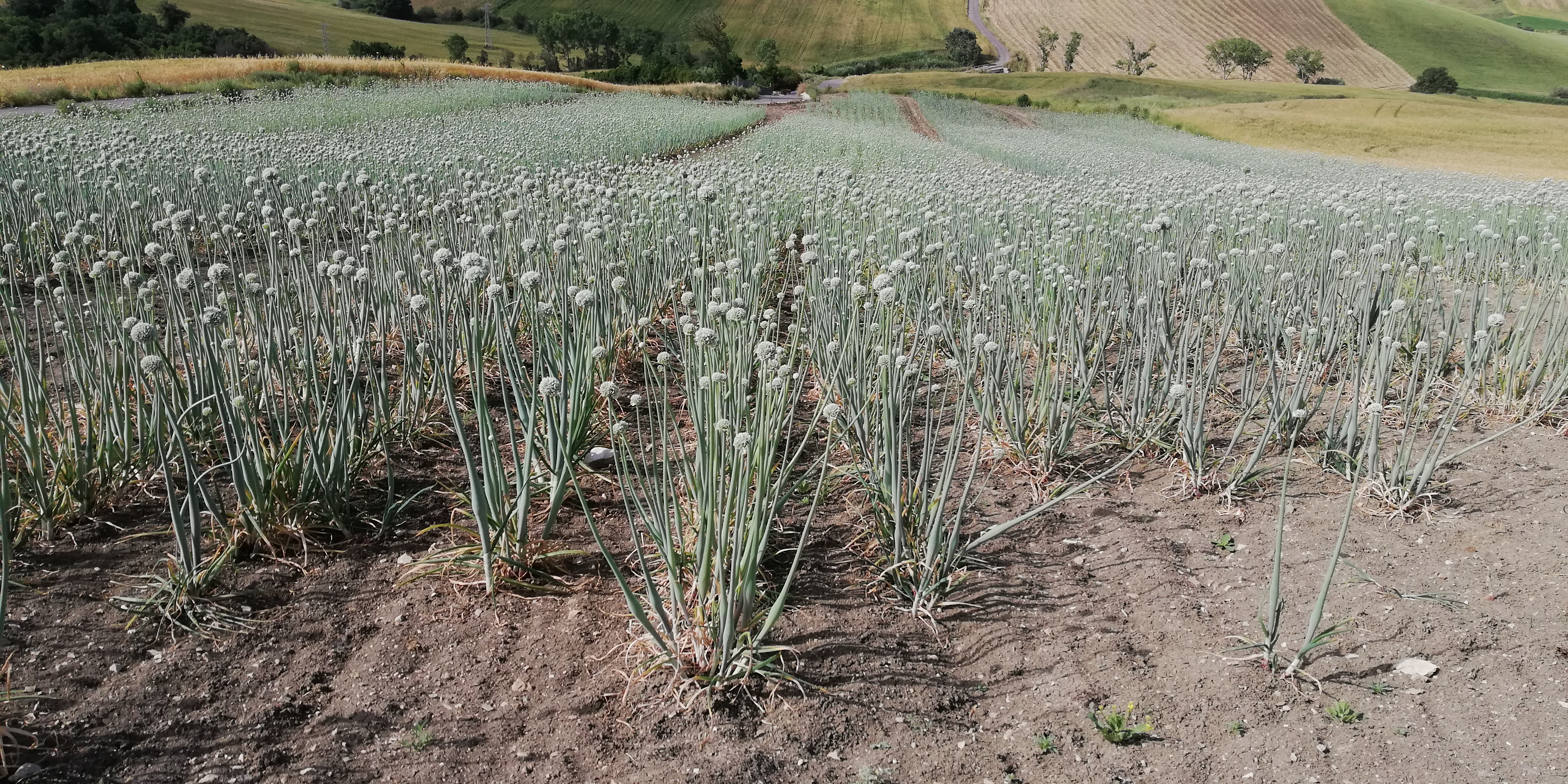 cipolle da seme prima della raccolta